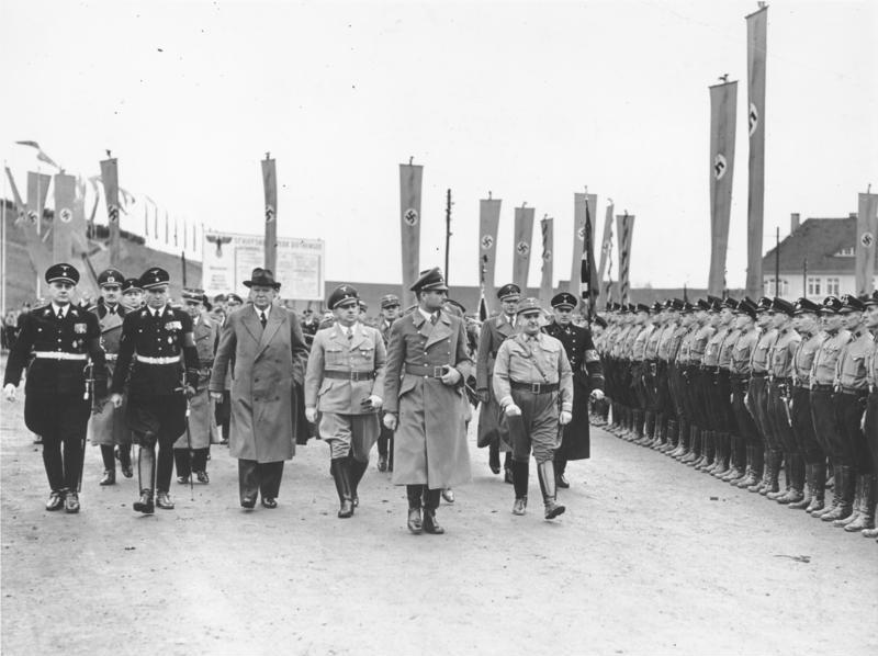 Feier zur Eröffnung des Mittellandkanales bei Magdeburg an der Schleuse Rothensee, Reichsminister Hess, Gauleiter Jordan, Reichsverkehrsminister Dr. Dorpmüller und links dahinter Reichsminister Seldte schreiten beim Eintreffen die Front der Marine-SA ab. (Ho) 14230-38, 30.10.38